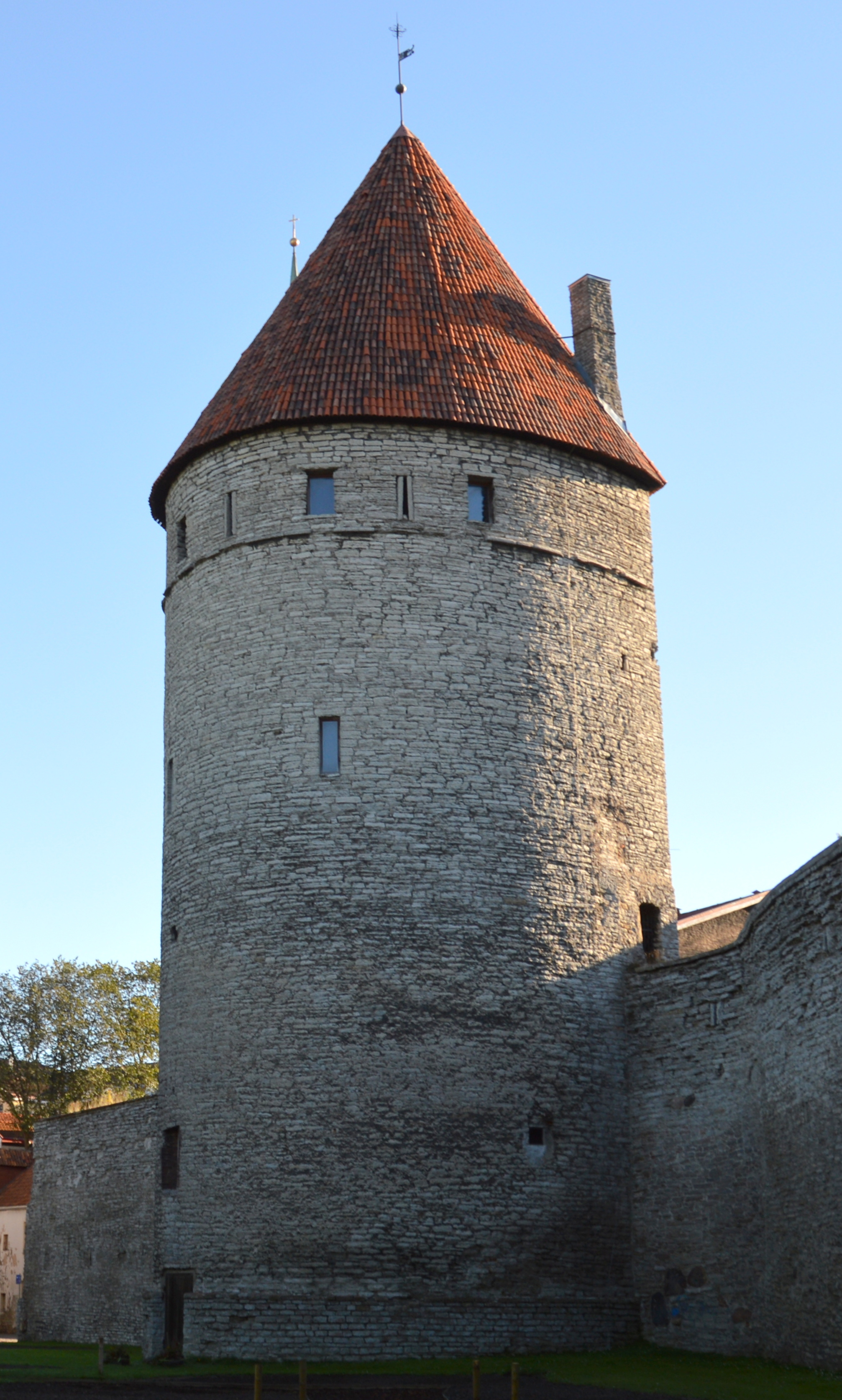 Reeperbahn Turm in Tallinn / Reval